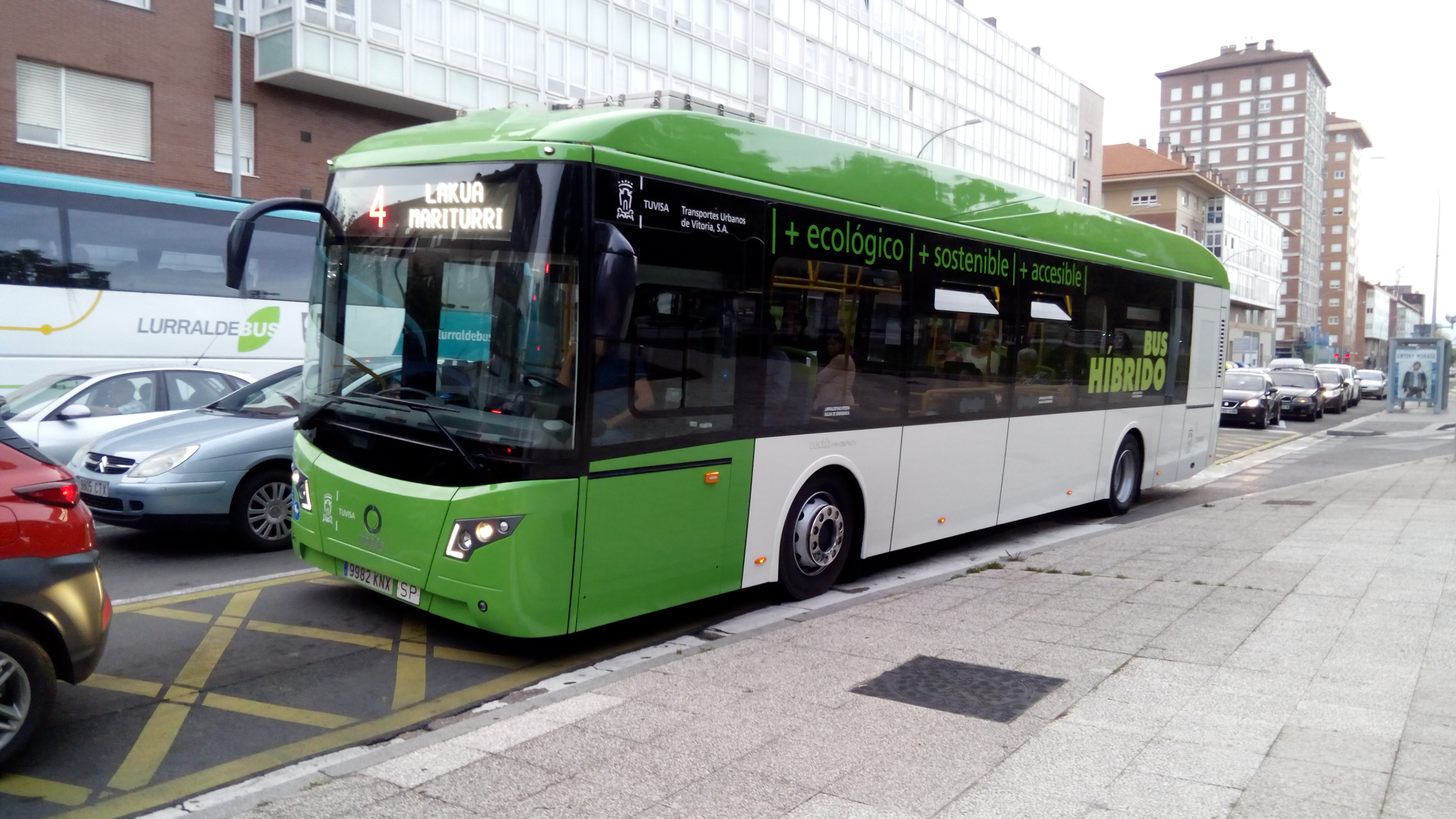 Tuvisa nuevo autobús híbrido